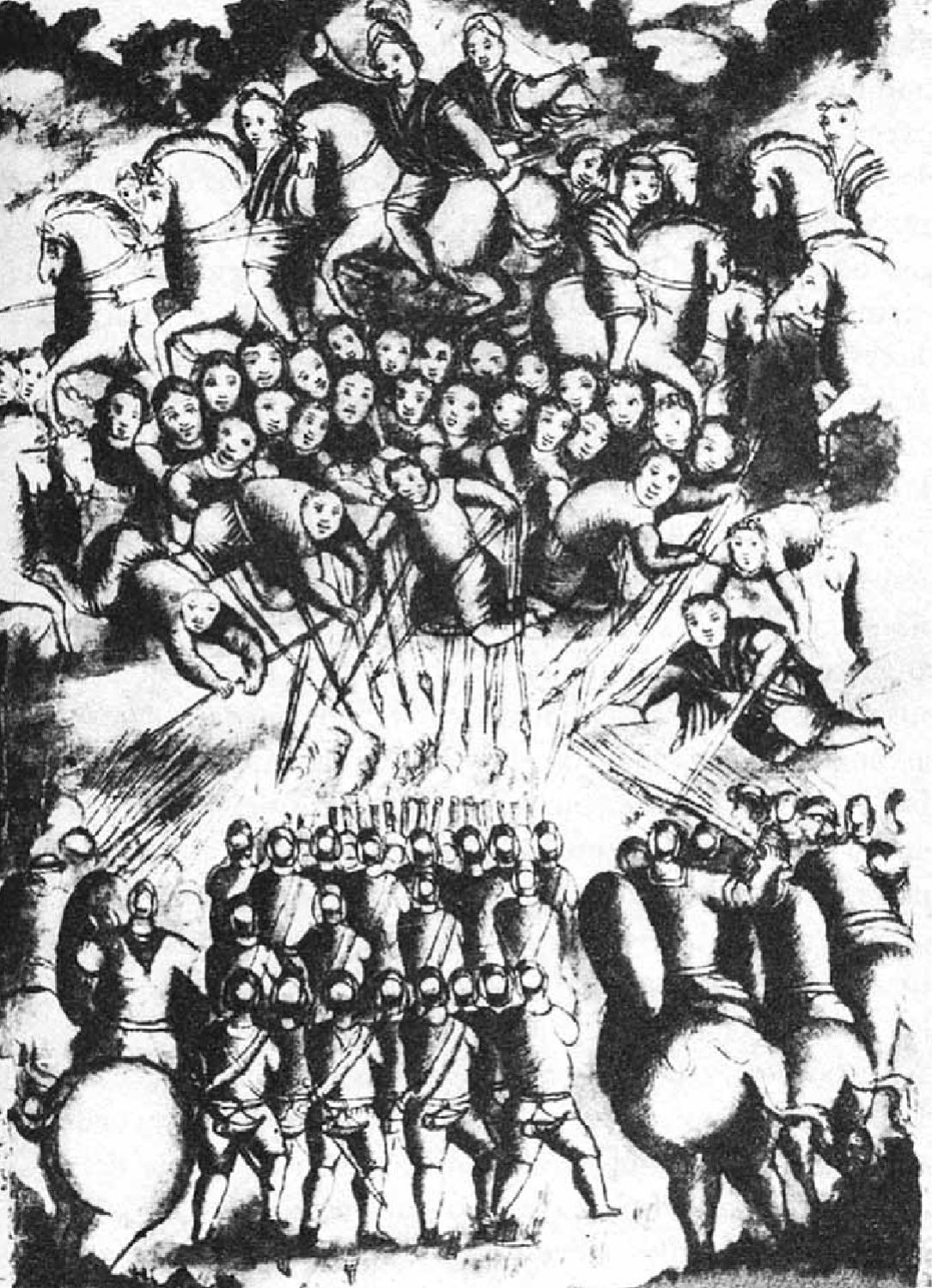 Batalla de las Cangrejeras por F. Nuñez de Pineda y Bascuñan 1673.